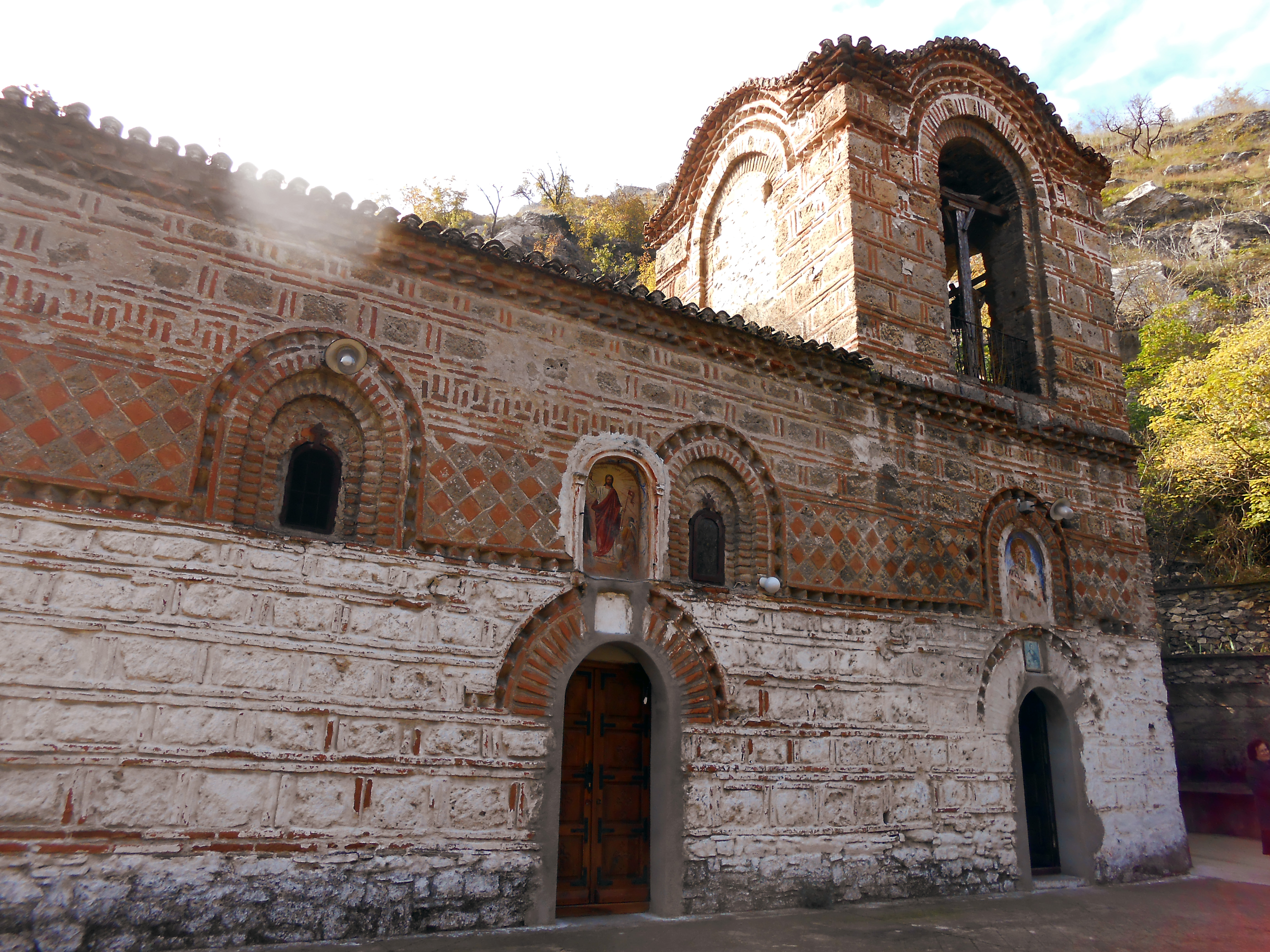 Црква “Св.Димитрие”. Велес, Македонија